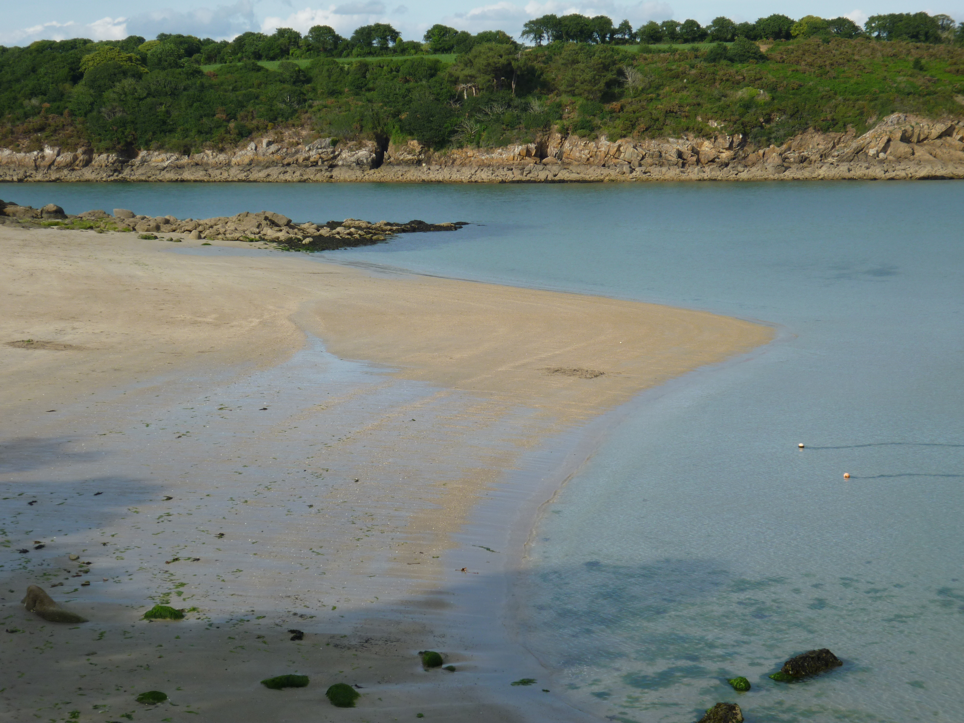 La plage de Port Manec'h (sud-Finistère) et l'embouchure de l'Aven